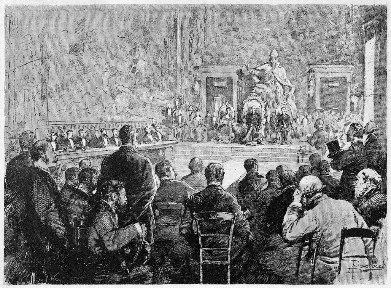 Roma. La distribuzione dei grandi premi scientifici all'Accademia dei Lincei in presenza delle Loro Maestà